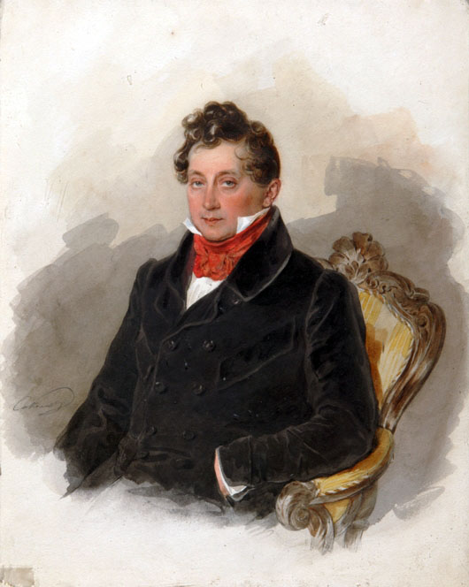 Mikhail Vielgorsky (1788-1856)